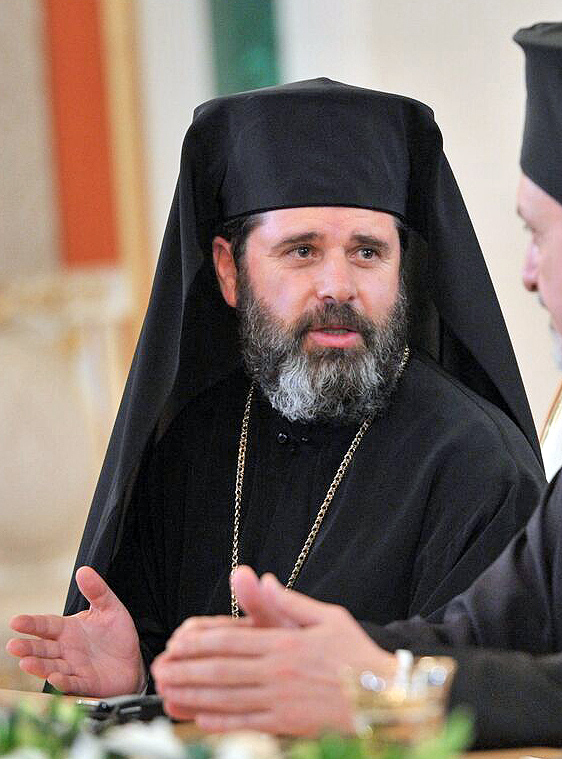 Митрополит Корчинский Иоанн, Митрополит Галльский Эммануил и Митрополит Варшавский и всея Польши Савва перед началом встречи с представителями поместных православных церквей.